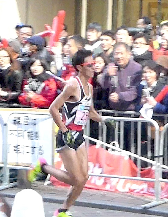 服部勇馬、2017年の東京マラソン(Yuma Hattori, 2017 Tokyo Marathon)